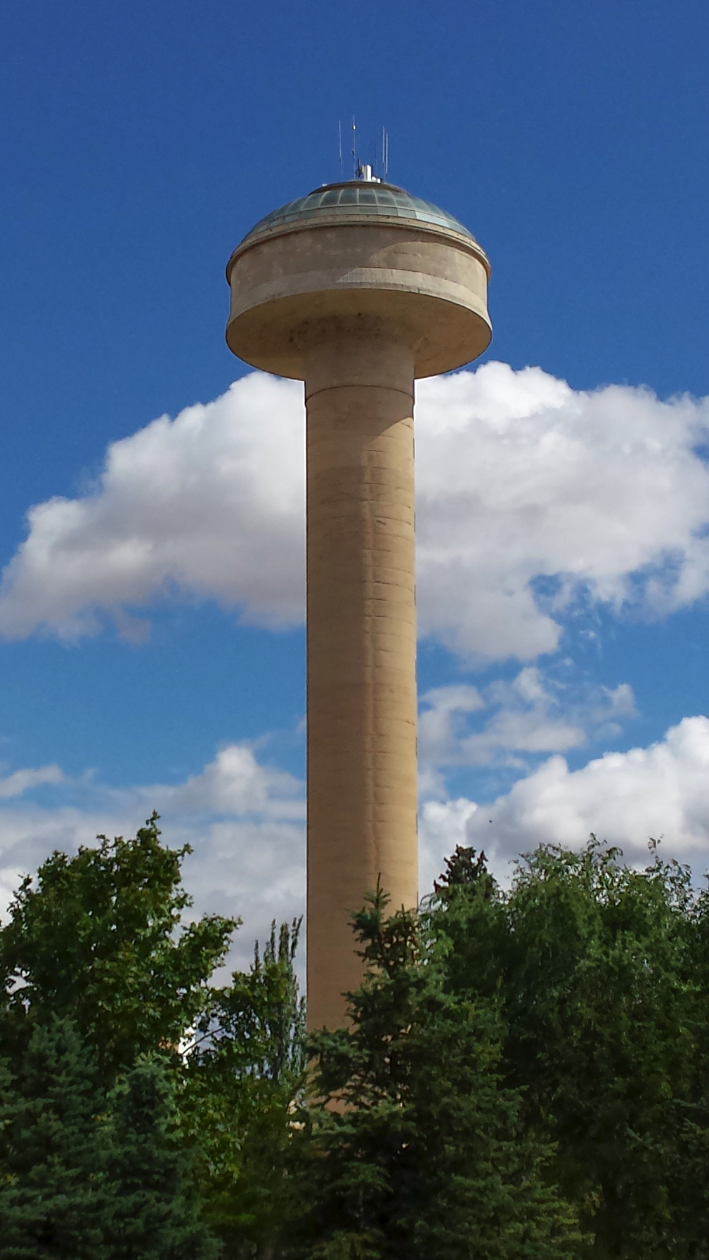 Depósito de Agua de la Fiesta del Árbol. Parque de la Fiesta del Árbol. Albacete